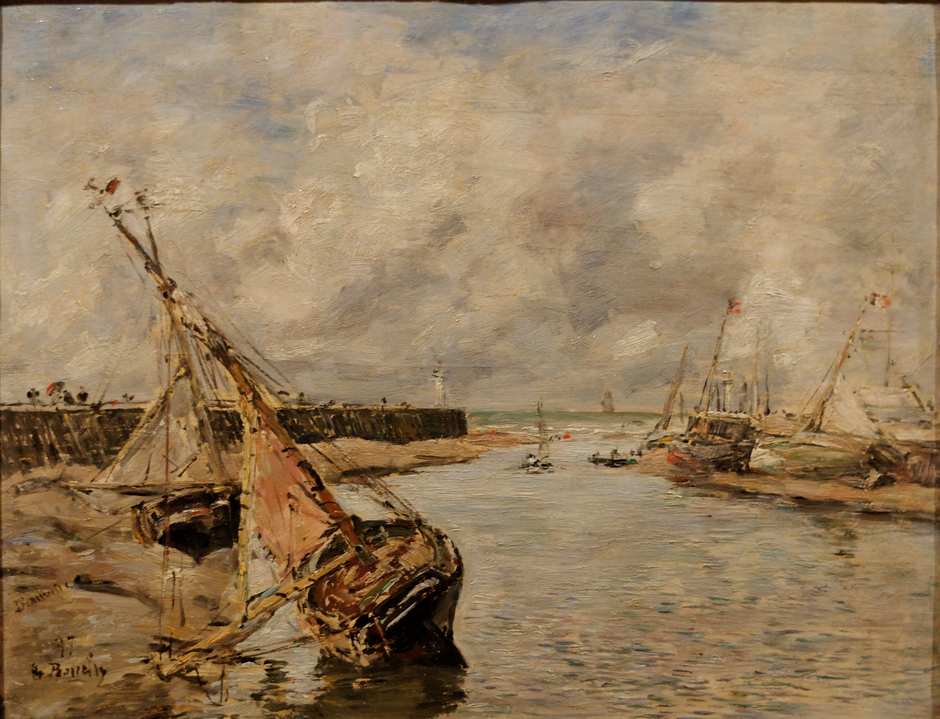 Trouville, marée basse. Huile sur bois d'Eugène Boudin 1897. Exposée au musée Calouste Gulbenkian, Lisbonne. Inv 2282